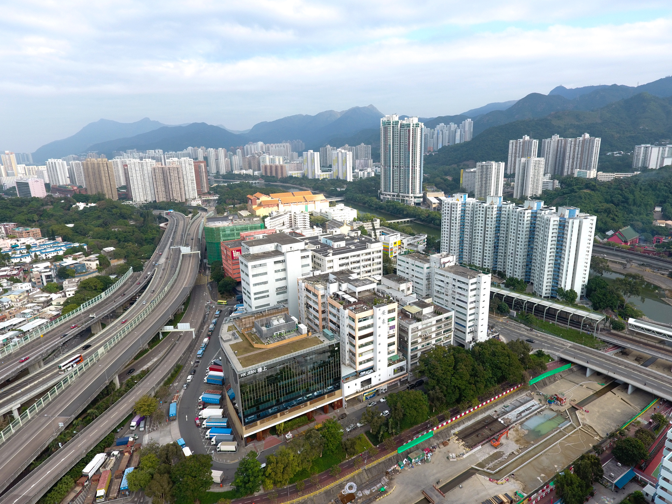 Tai Wai Industrial Area